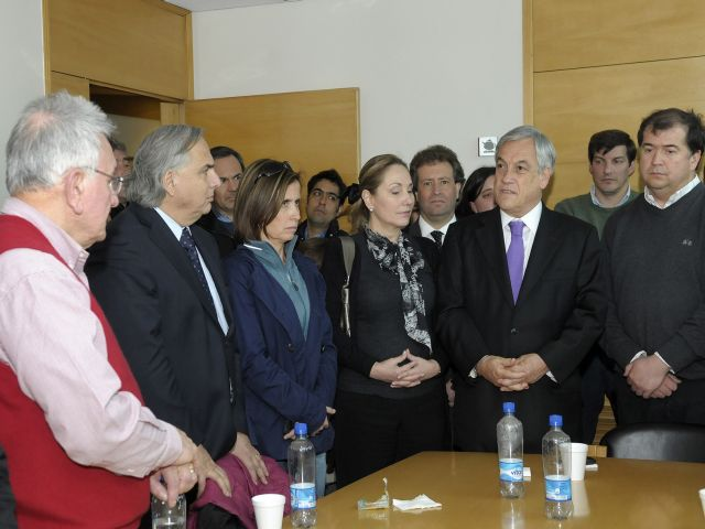 El Presidente de la República, Sebastián Piñera, acompañado de su señora, Cecilia Morel, visitó Televisión Nacional de Chile (TVN), para entregar su apoyo a los miembros del canal y al equipo del programa Buenos Días a Todos, tras el accidente ocurrido ayer en Juan Fernández. En la oportunidad, el Jefe de Estado señaló que “desgraciadamente lo de ayer fue un golpe muy duro para Televisión Nacional, porque en el avión viajaba un equipo del canal. Lo que yo quería expresar hoy día es mi más profunda solidaridad, comprensión, porque yo sé que muchos de los familiares de las personas que estuvieron en ese avión, están viviendo momentos de mucha angustia y de mucha incertidumbre. Yo quería decirles que el país entero está con ellos”. Agregó que “hasta ahora sabemos que son cuatro personas las que han fallecido, eso es lo que tenemos certeza, pero también sabemos que la magnitud del accidente fue extremadamente grave. Y sin que perdamos las esperanzas, porque nunca hay que perderlas, esto fue un accidente muy grave y el pronóstico no es favorable”. Asimismo, aseguró que “tanto el Gobierno, como las Fuerzas Armadas, particularmente la Fuerza Aérea de Chile, han hecho todo lo posible para que esta operación de búsqueda y rescate, fuera hecha con la calidad y la rapidez que requería”. El Mandatario finalizó diciendo que asistió al canal “a expresarle a sus máximas autoridades nuestra solidaridad, nuestro respaldo y nuestro apoyo”.